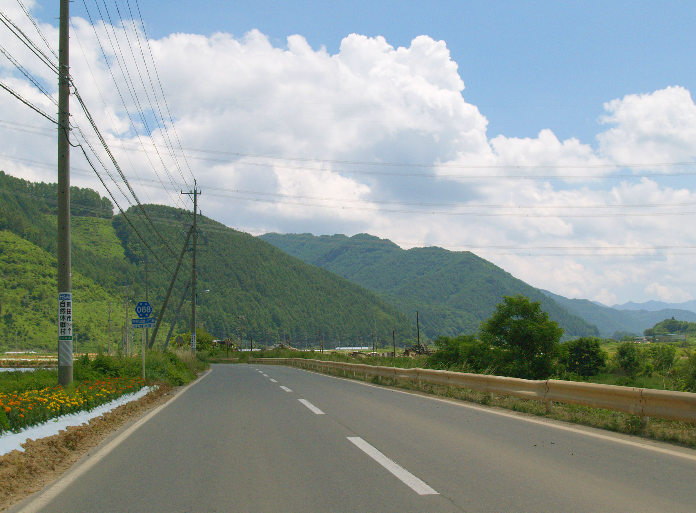 長野県道68号梓山海ノ口線（川上村にて）